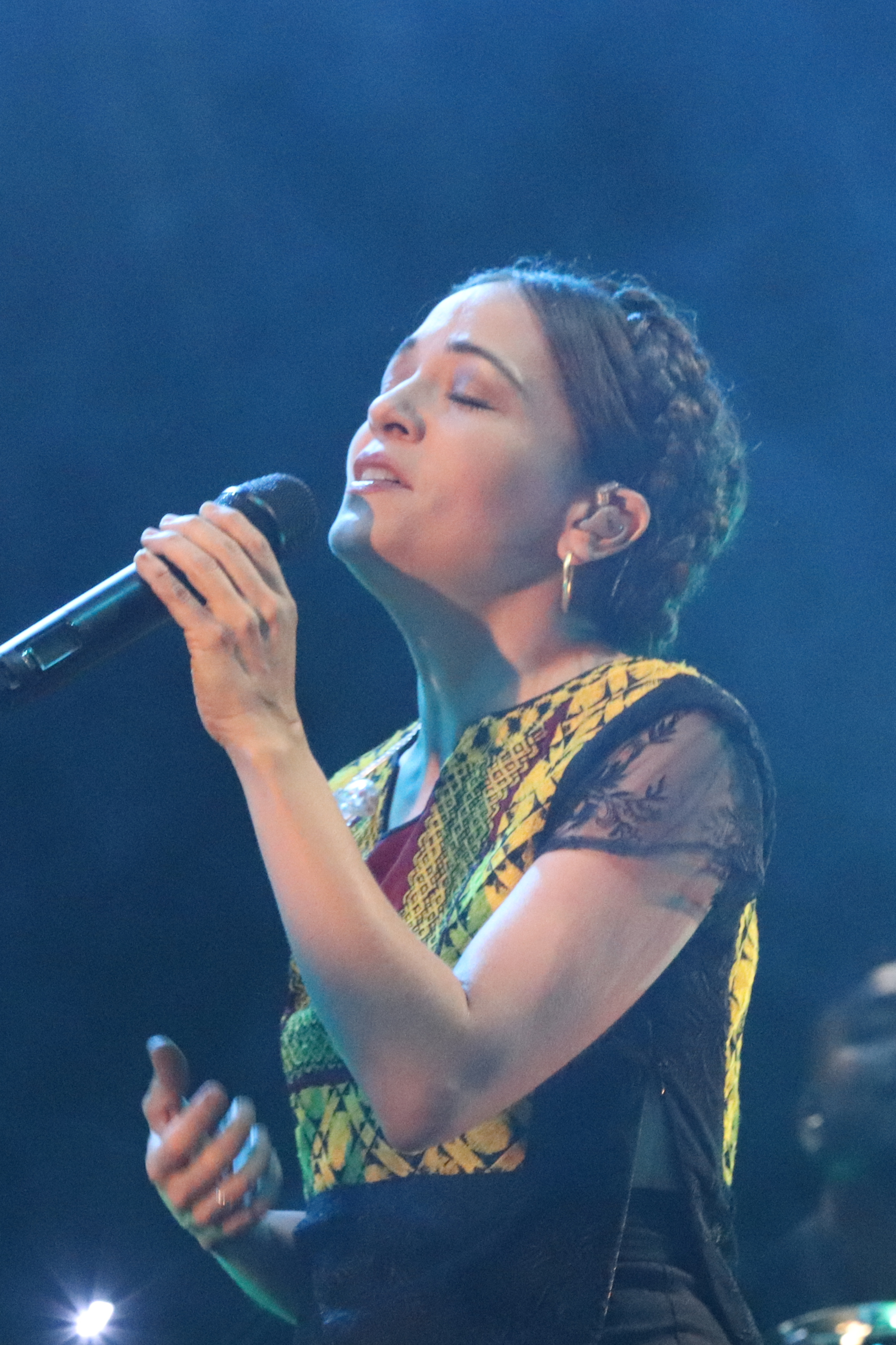 Natalia Lafourcade en el Teatro Gran Rex Argentina